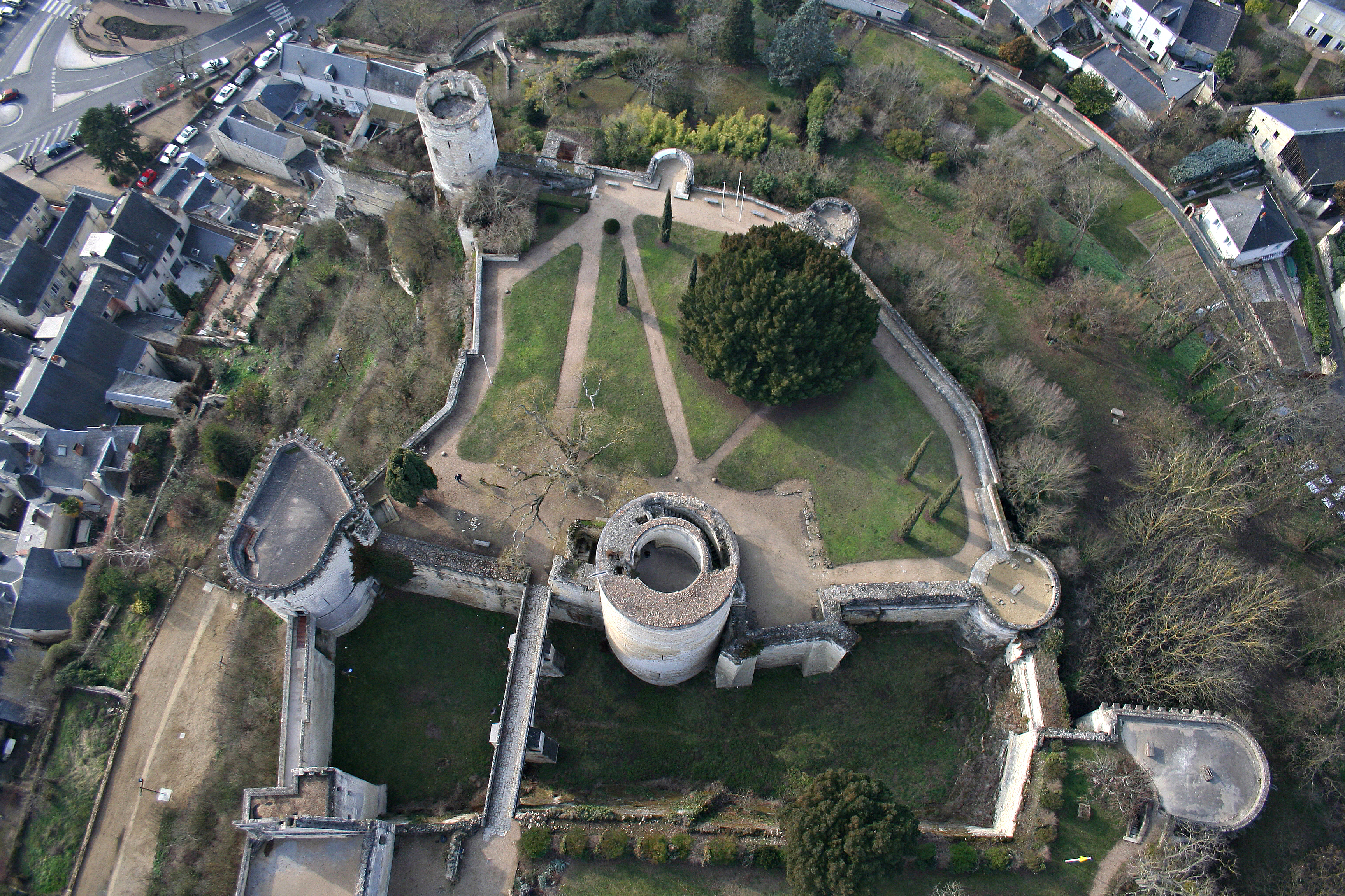 Grâce à cette vue aérienne du fort du Coudray, on visualise très bien les éléments forts du système défensif de ce qui était conçu comme un bastion ultime : fossé sec large et profond enjambé autrefois par un pont-levis protéger par cette tour maîtresse qu'est le donjon du Coudray